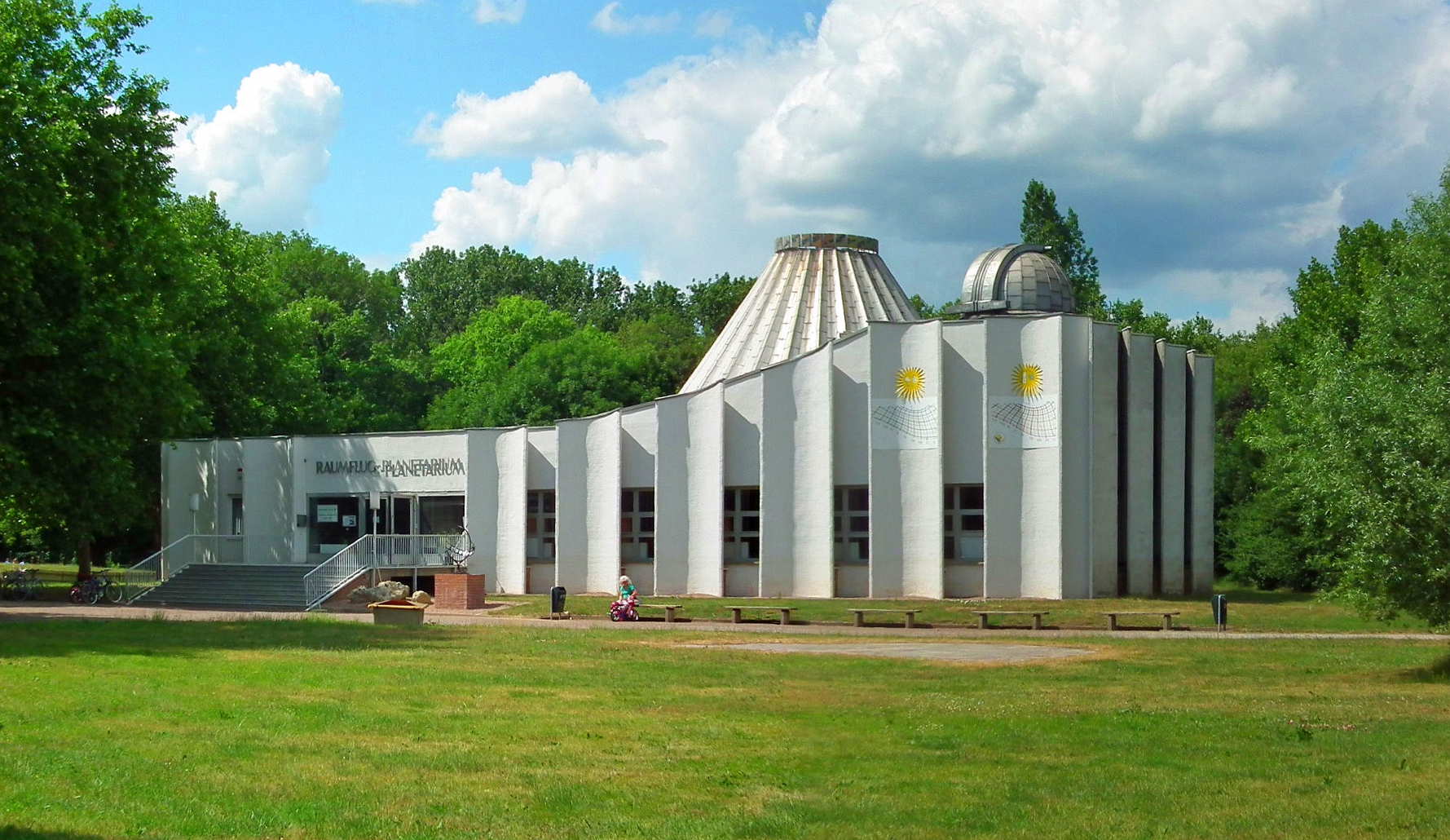 Planetarium Peißnitz